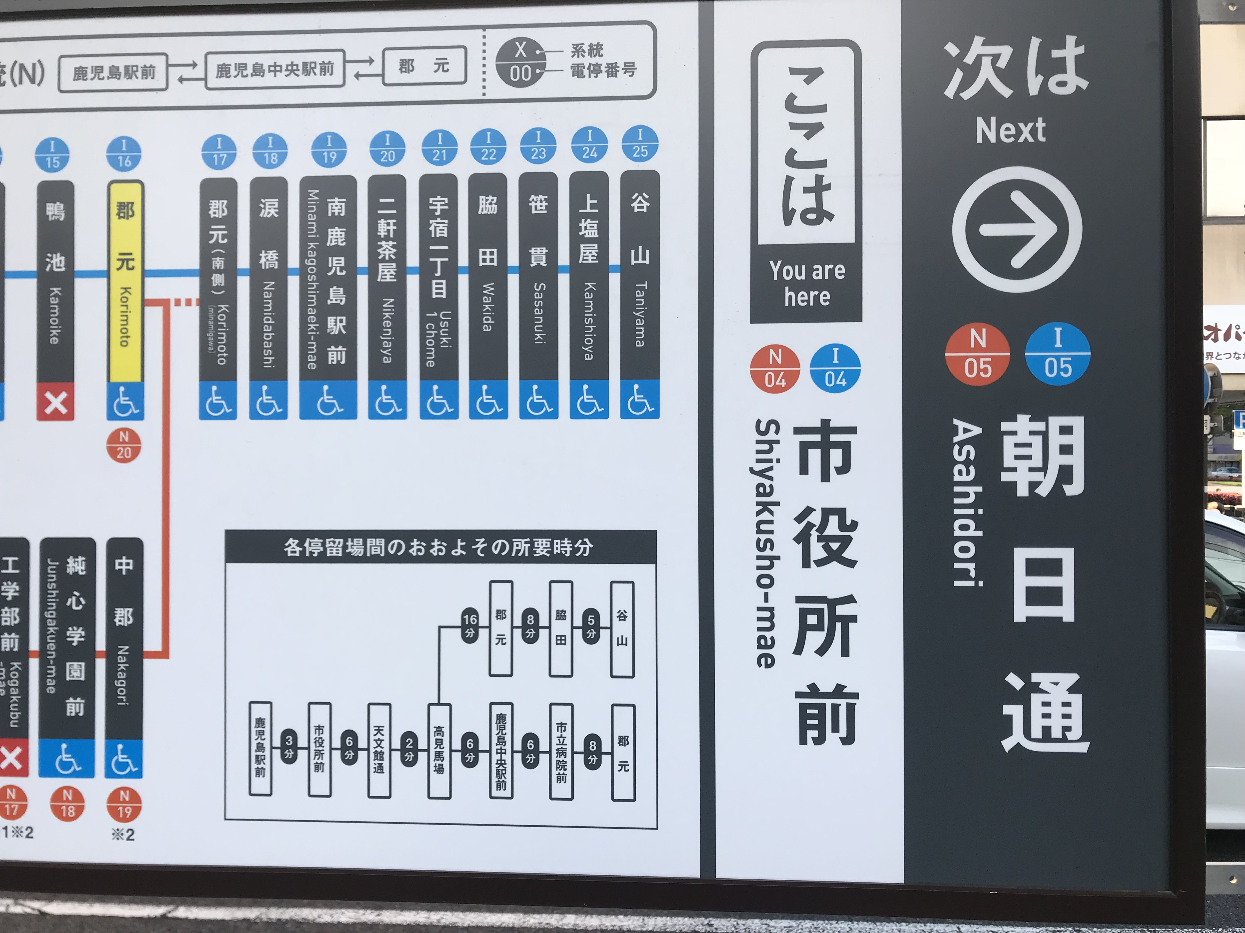 市役所前電停の駅名標